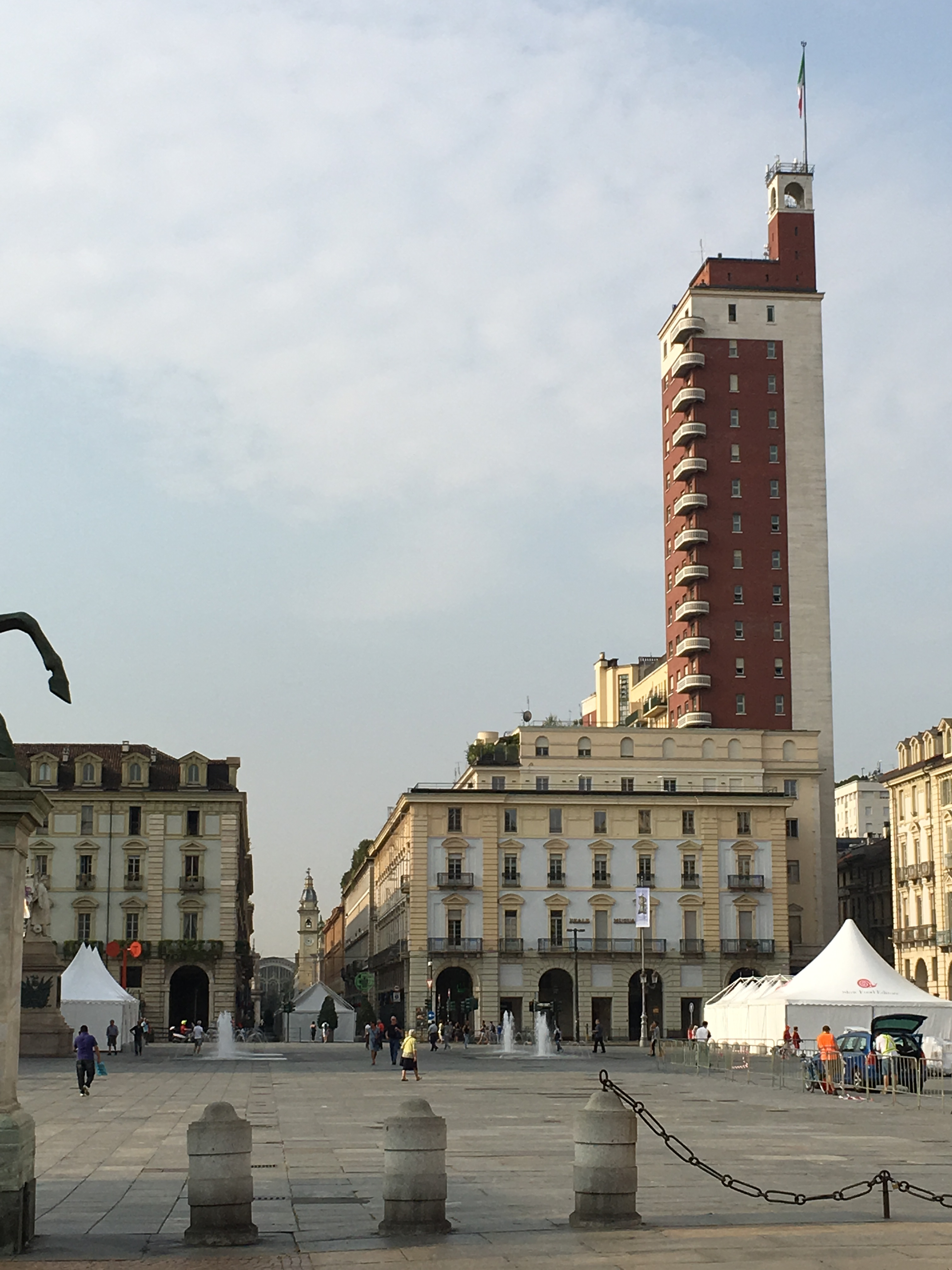 Torre littoria vista da piazza Castello. Torino